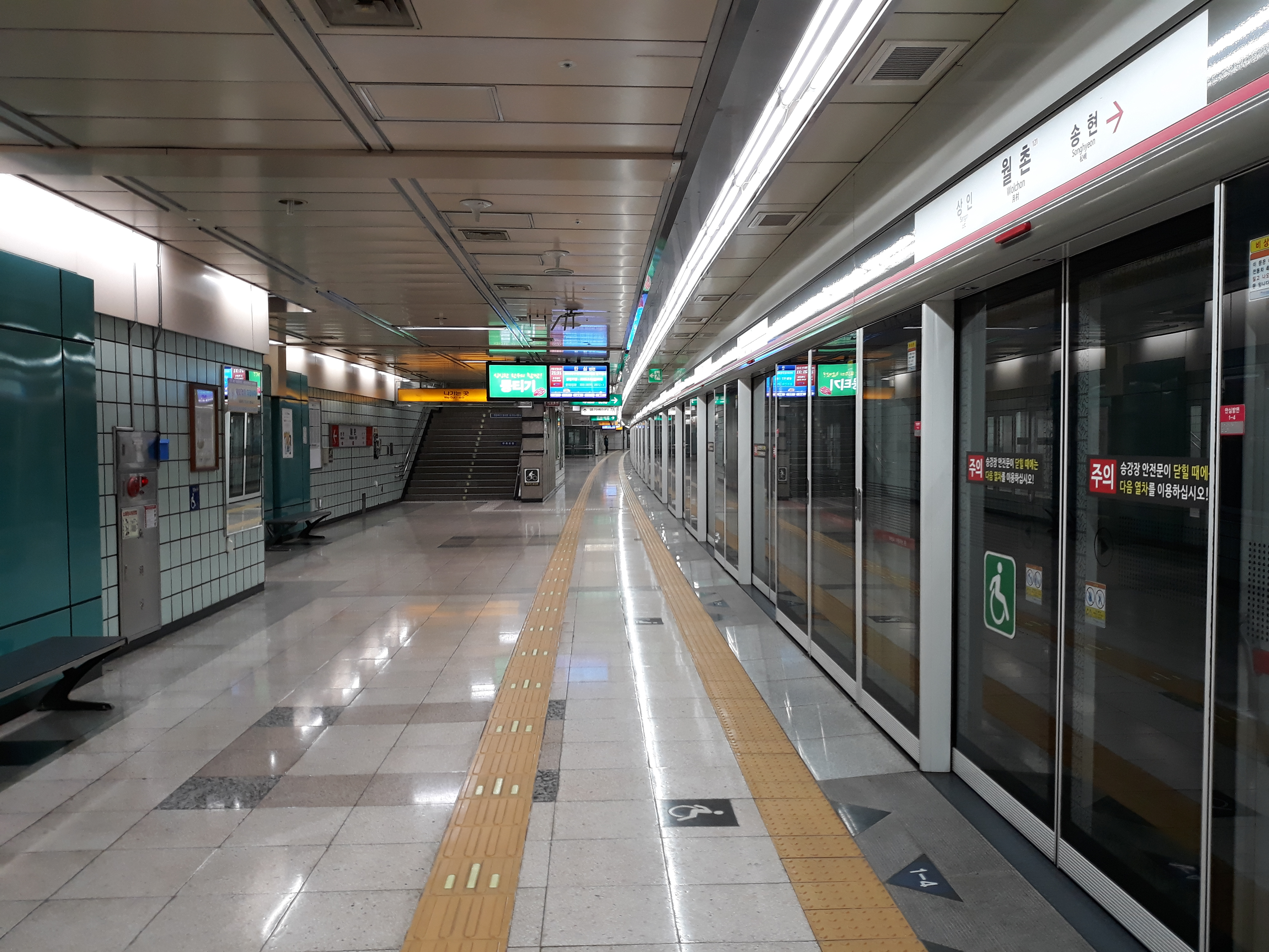 대구 도시철도 1호선 월촌역 안심 방면 승강장